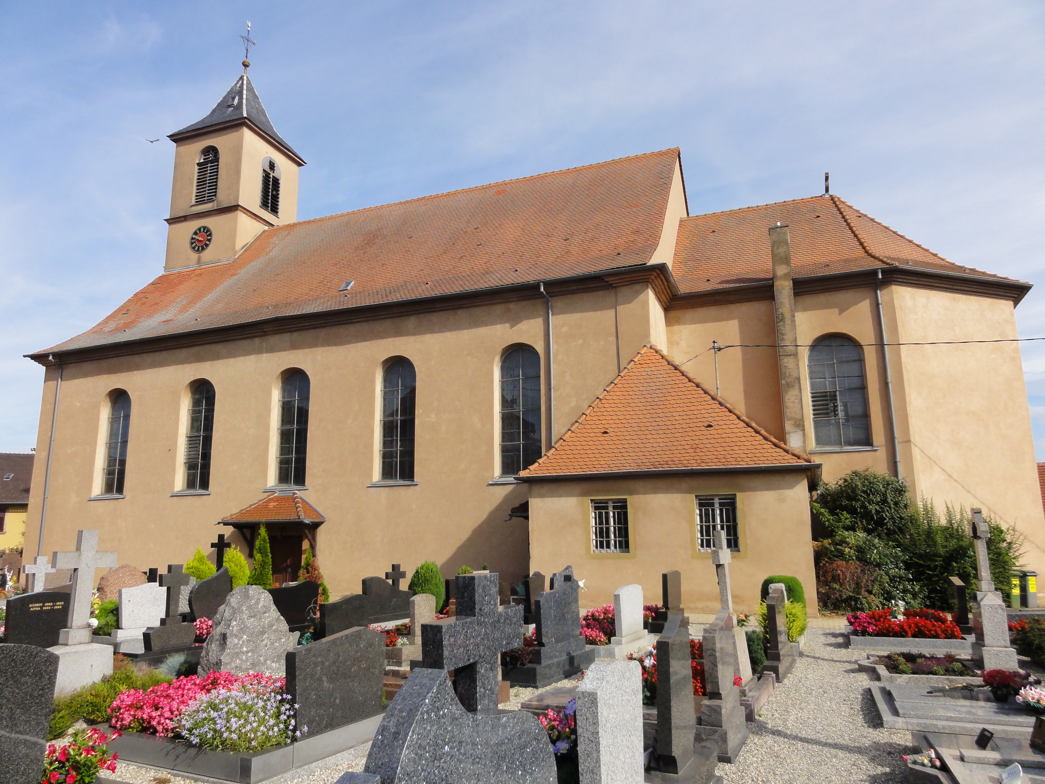 Alsace, Bas-Rhin, Église St Kilian de Dingsheim (IA67005517).